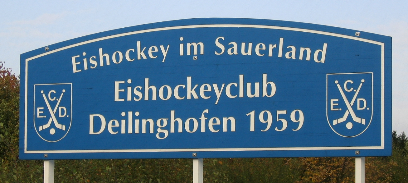 Schild auf dem Gelände der ECD-Erinnerungsstätte in Hemer-Deilinghofen. Errichtung im Jahr 2004.